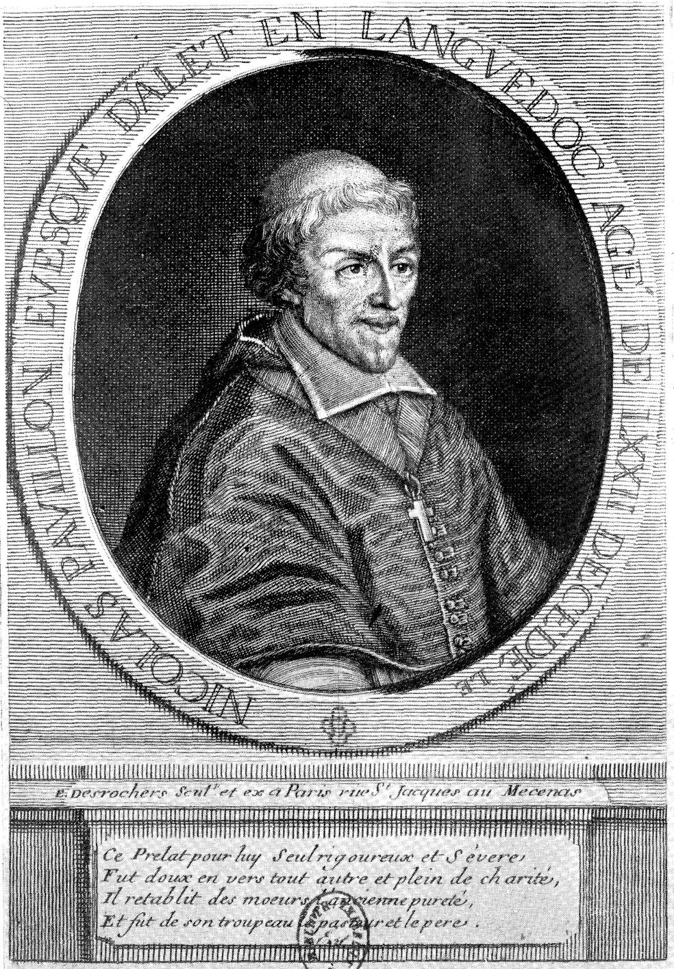 gravure représentant Nicolas Pavillon, évêque d'Alet.